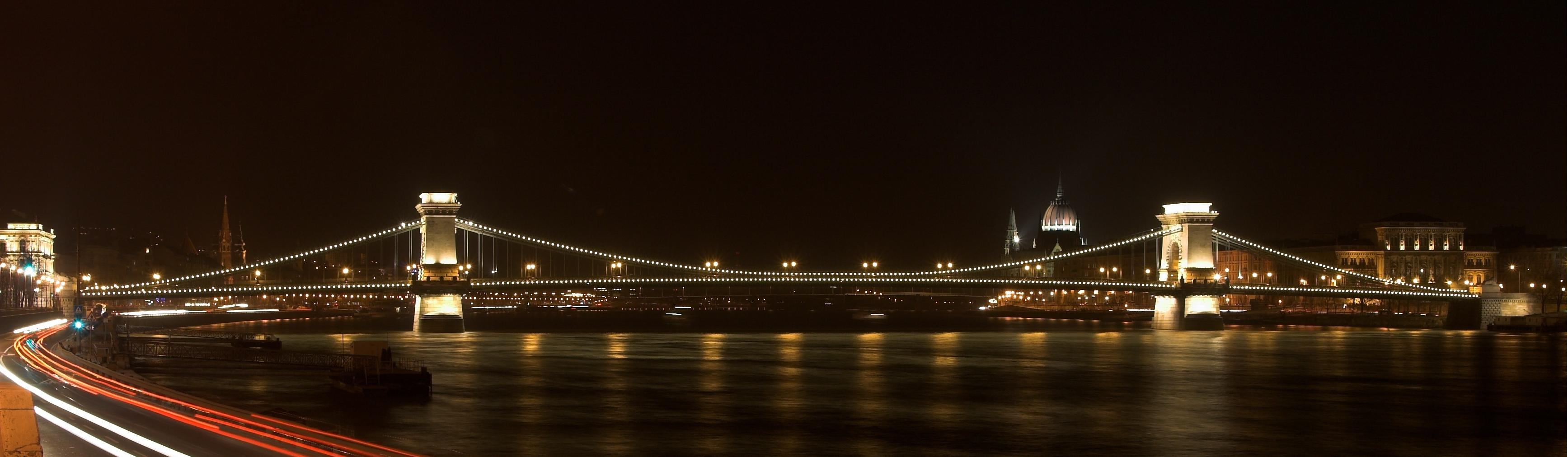 A Széchenyi lánchíd éjszaka. Előtérben a Duna, háttérben a Parlament, jobbra a Magyar Tudományos Akadémia.